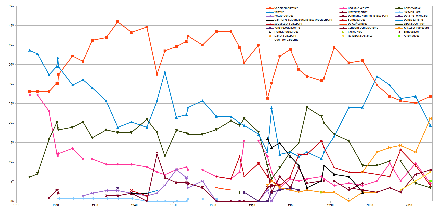 En oversigt over procentfordelingen af mandater ved Folketingsvalg i perioden 1913-2015.